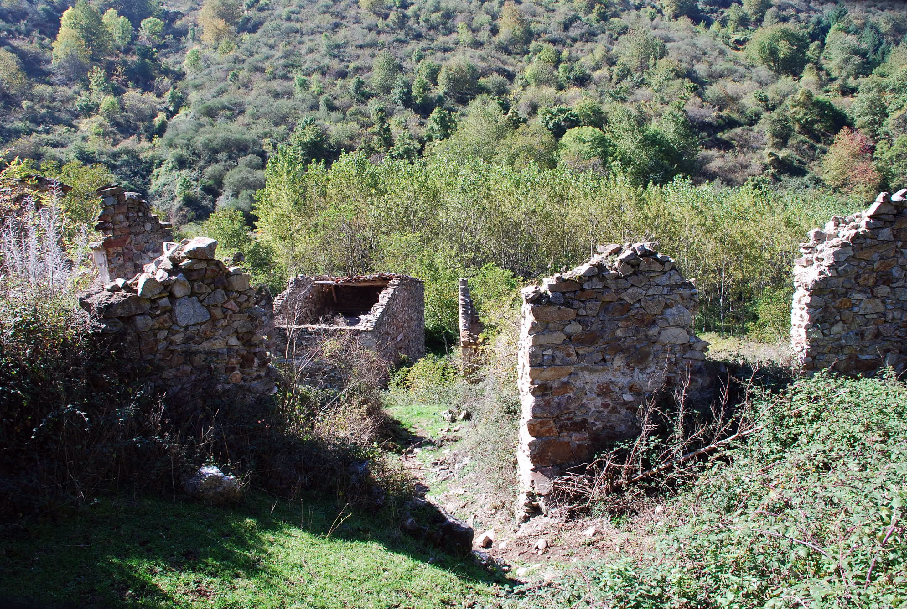 Cilbarrena, aldea abandonada de Ezcaray